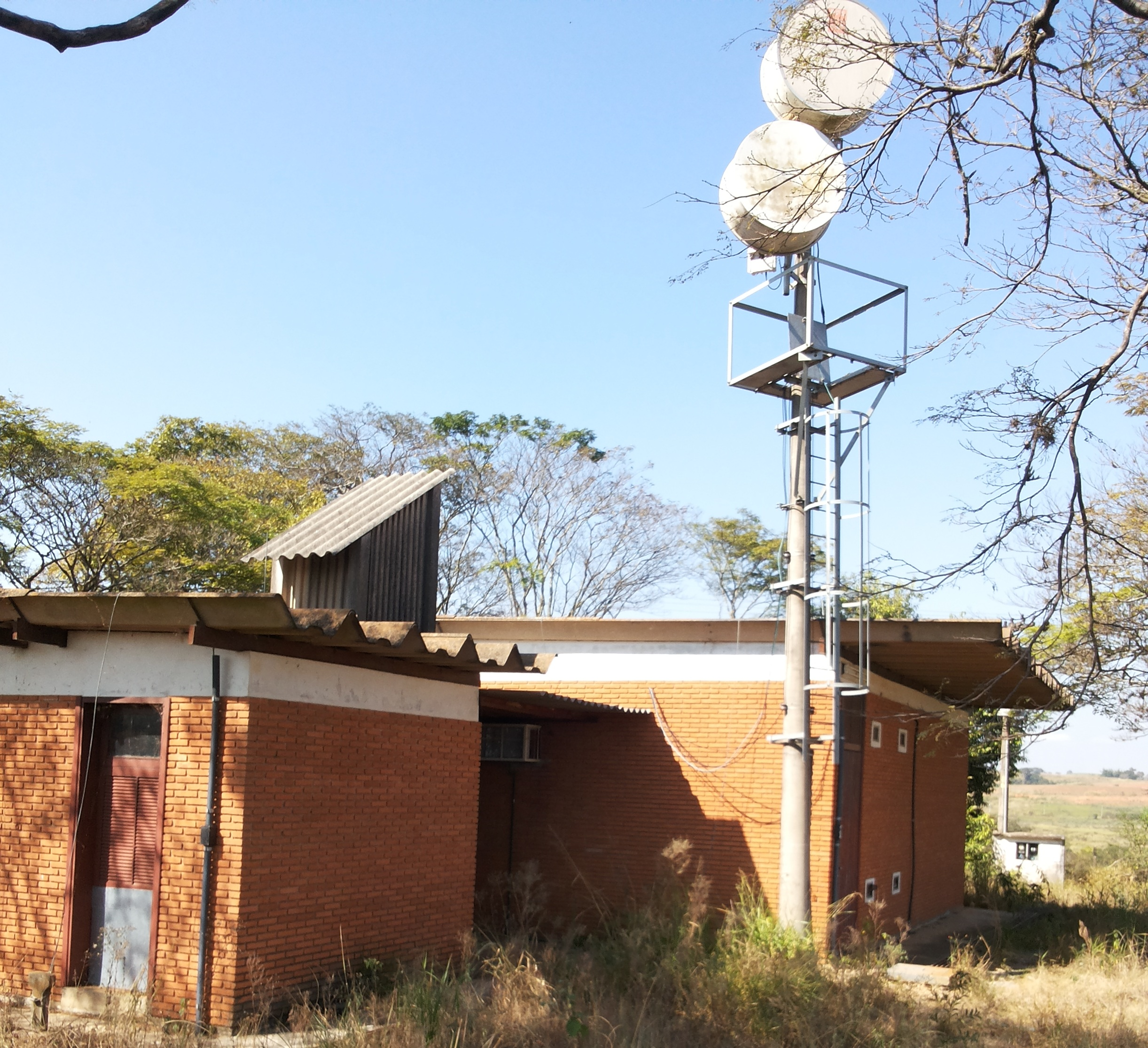 Central Telefônica Horto Florestal - Km 139 Via Anhanguera - Limeira - SP - 2018